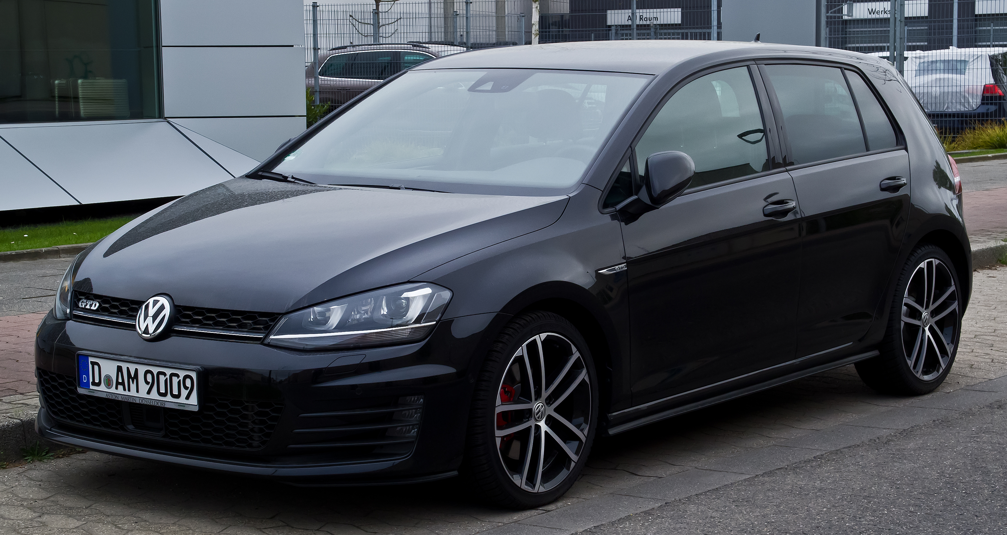 VW Golf GTD (VII)